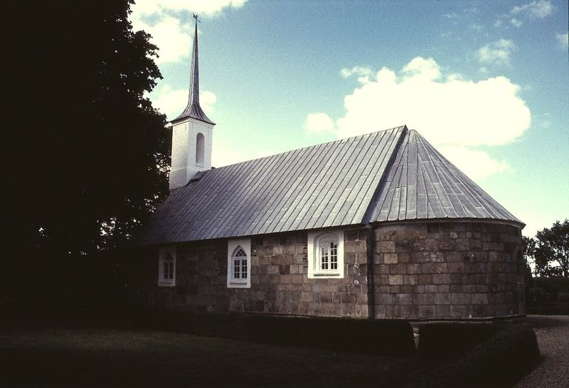 Bur Kirke i Danmark. Bur kirke